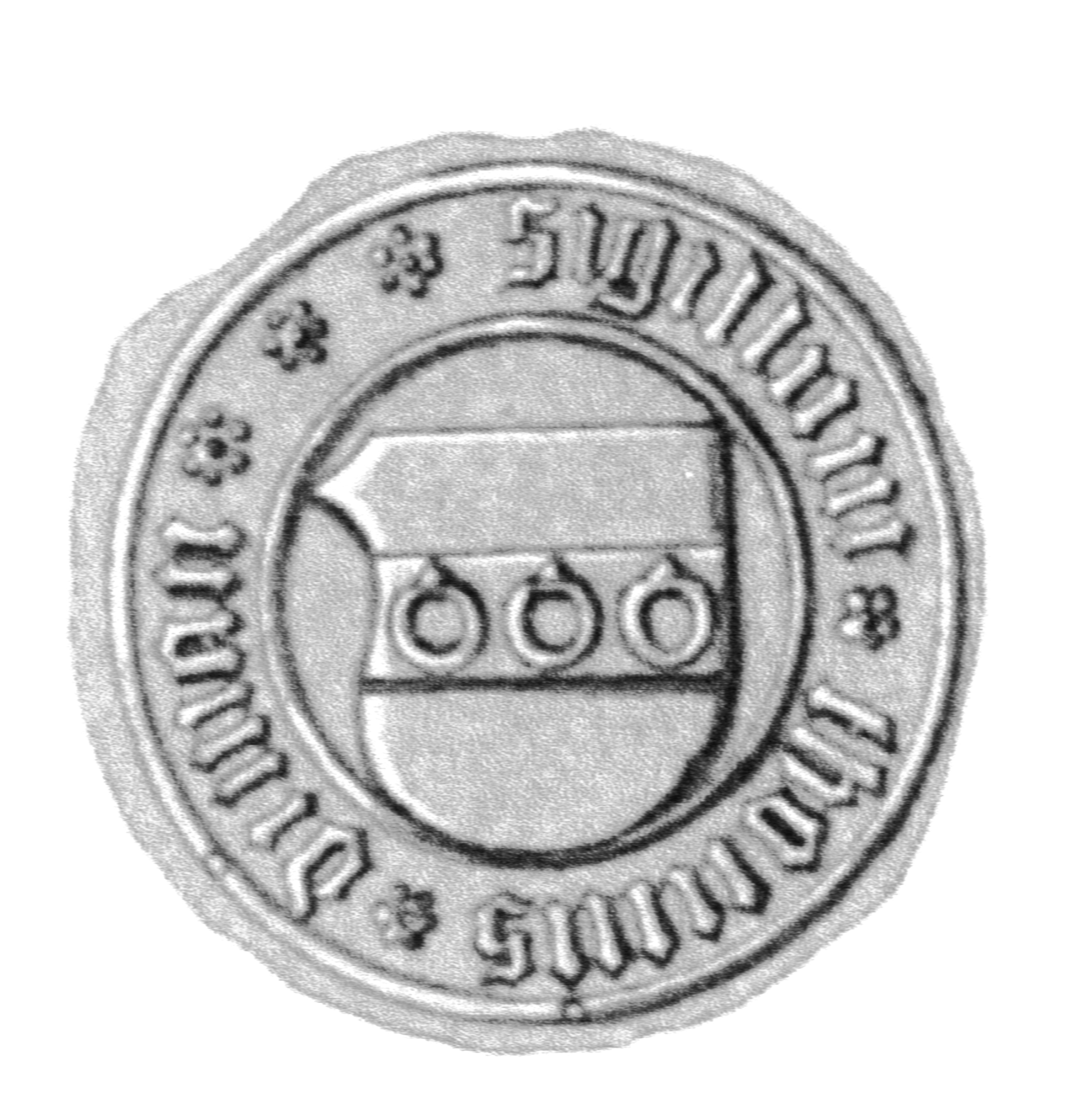 Siegel des Tonnyes Dremant Sohn von Thonies Di(y)man?. Das Siegel stammt aus der Zeit um 1504. Sohn des 1498 verstorbenen Ratmannes Anton Dimant, siehe Emil Ferdinand Fehling: Lübeckische Ratslinie, Nr. 558.